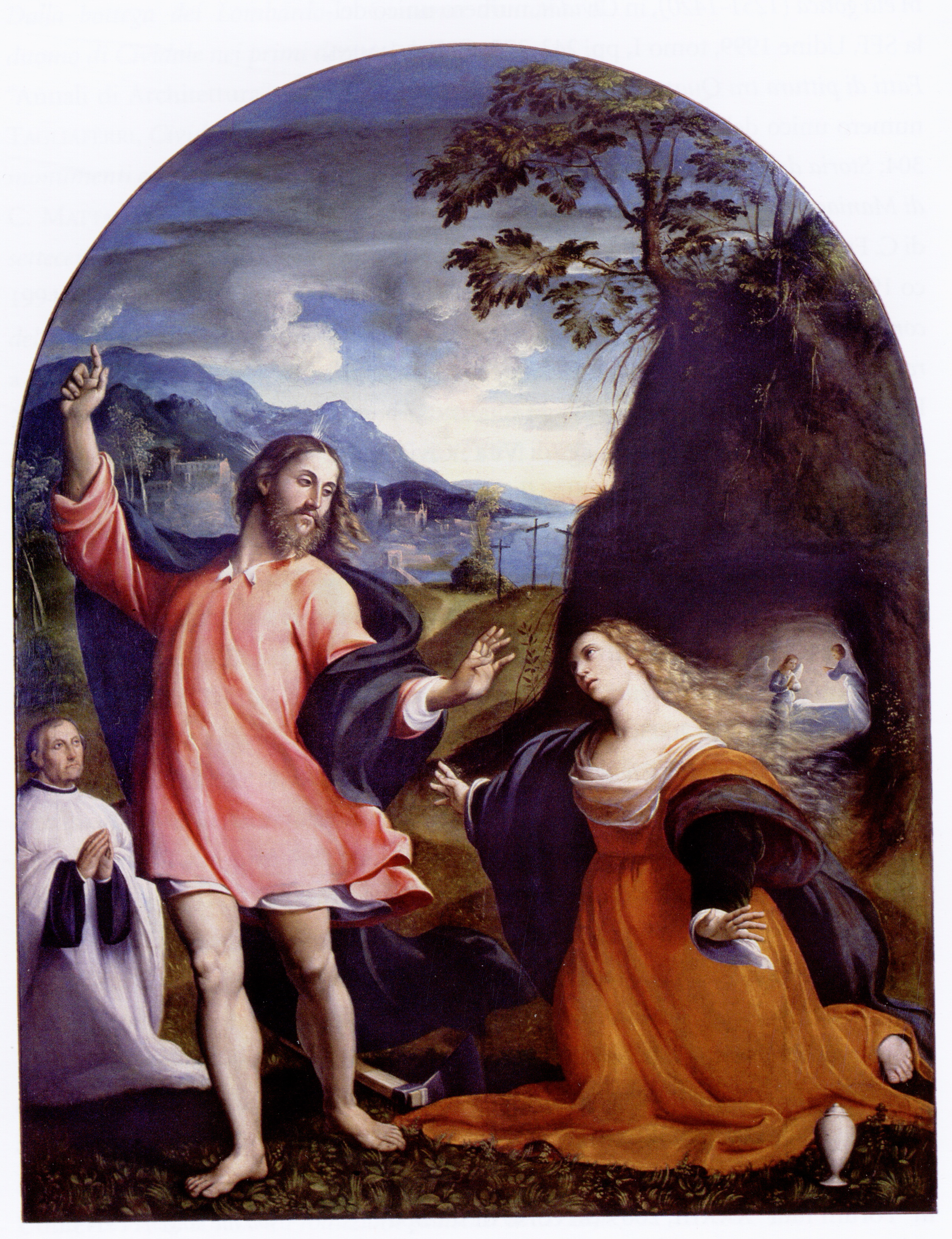 Giovanni Antonio de' Sacchis (Il Pordenone) - Noli me tangere - 1524 - Museo del Duomo - Cividale del Friuli